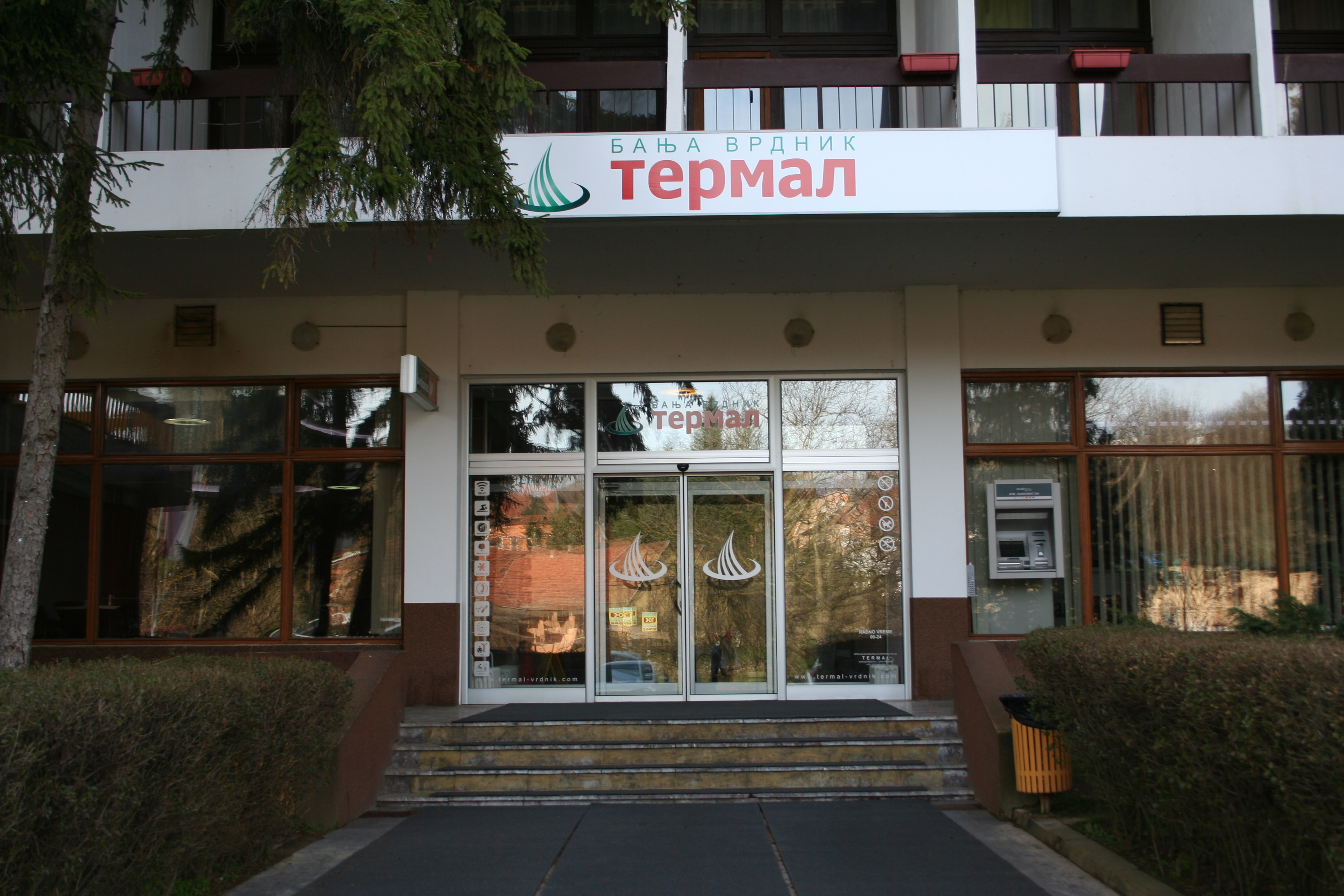 Hotel Termal (Vrdnik)